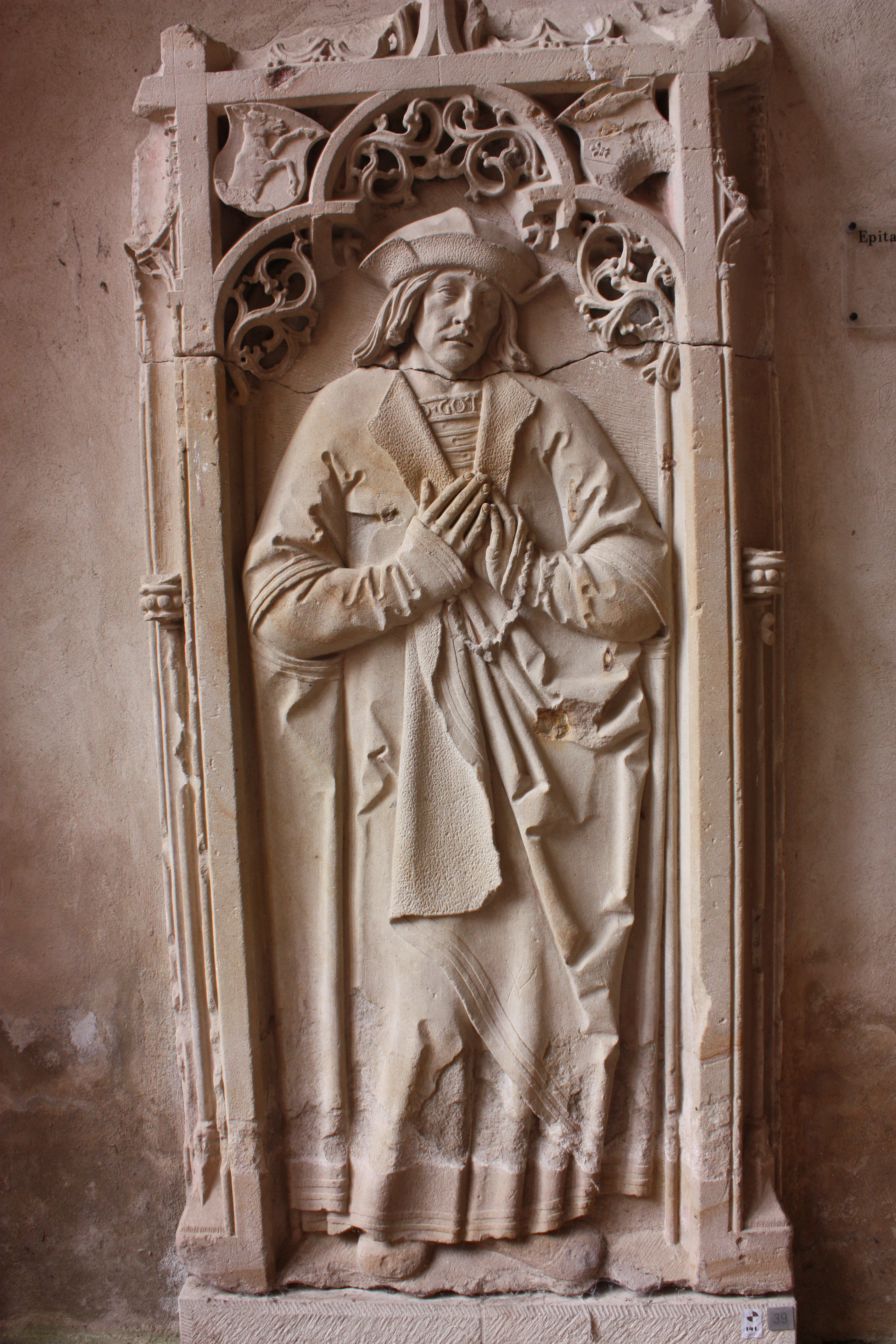 Grabplatte des Wigand von Hynsperg in der Basilika des Kloster Eberbach; geschaffen von Hans Backoffen